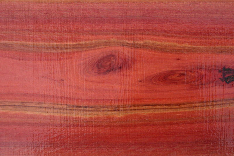 Bois de Eucalyptus camaldulensis